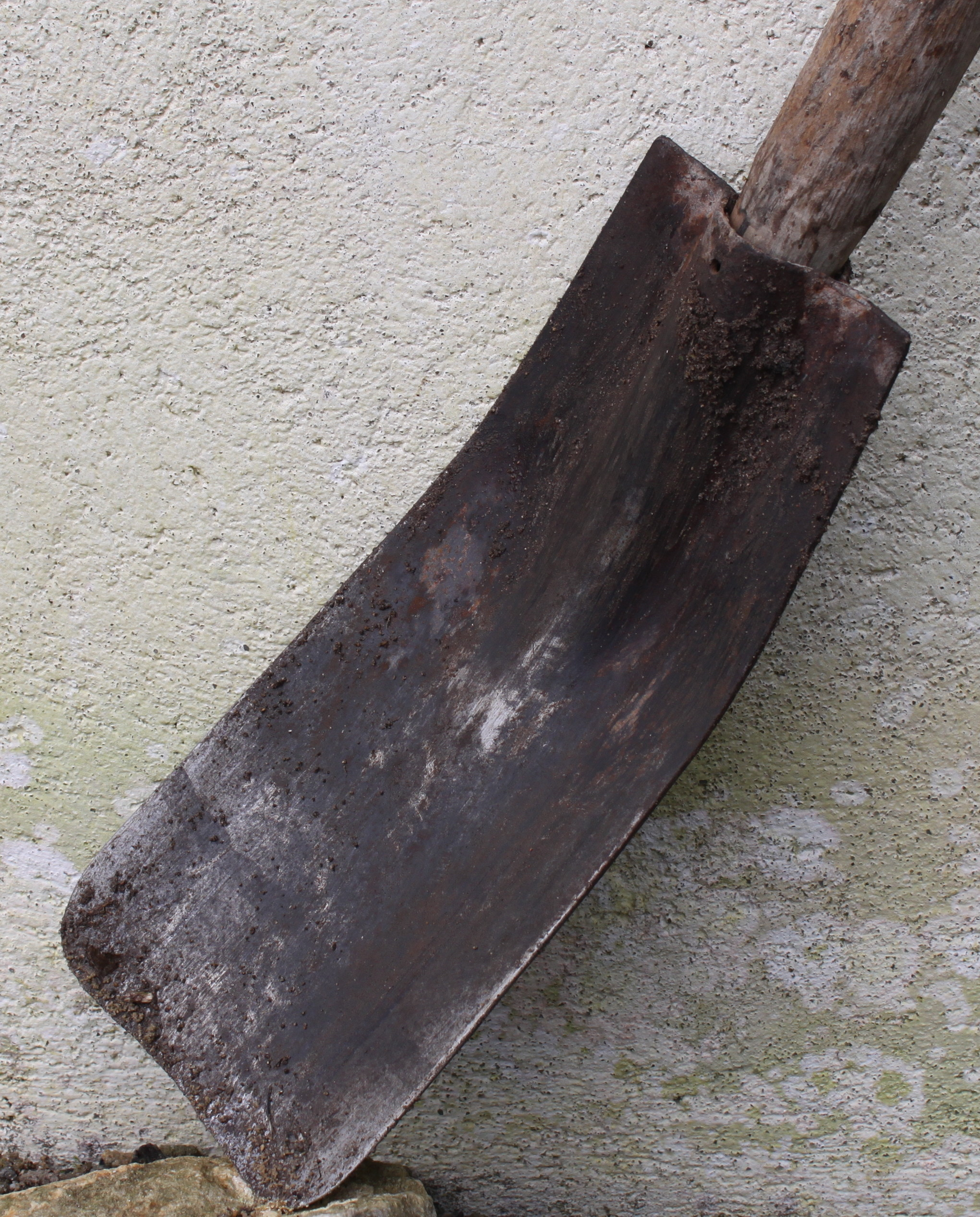 une fraïe